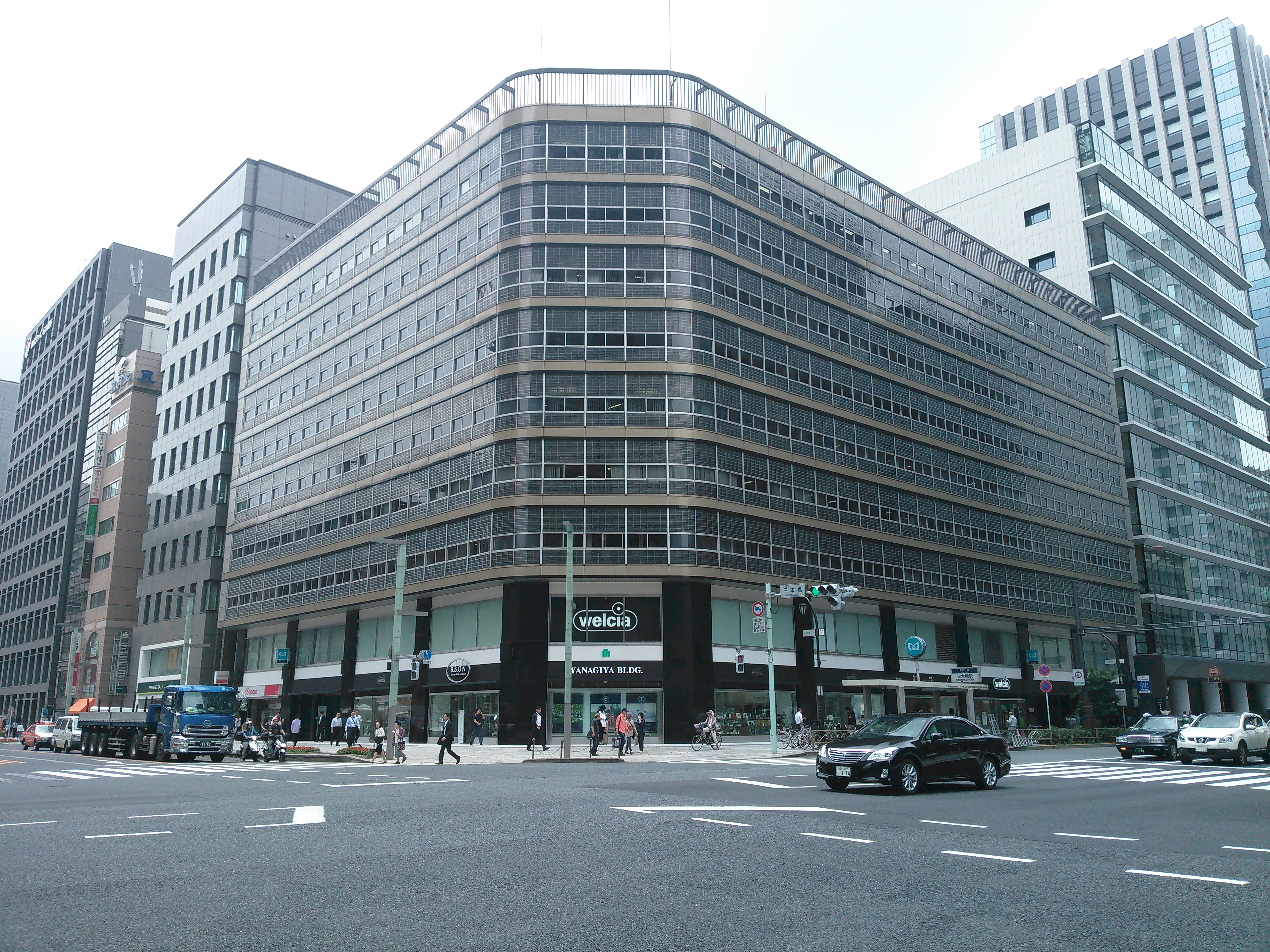 東京・日本橋、柳屋ビルディング